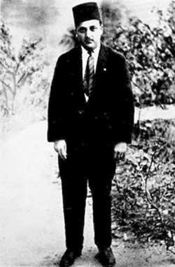 Shoghi Effendi as young man.